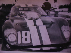 Fotografía del Prototipo Steven Ford F-100